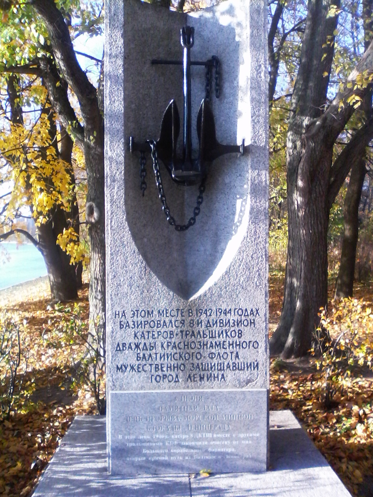 Памятник у пристани на Елагином острове, на которой во время Великой отечественной войны базировался дивизион тральщиков. Посвящён прорыву 5 июня 1946 года морской минной блокады Ленинграда